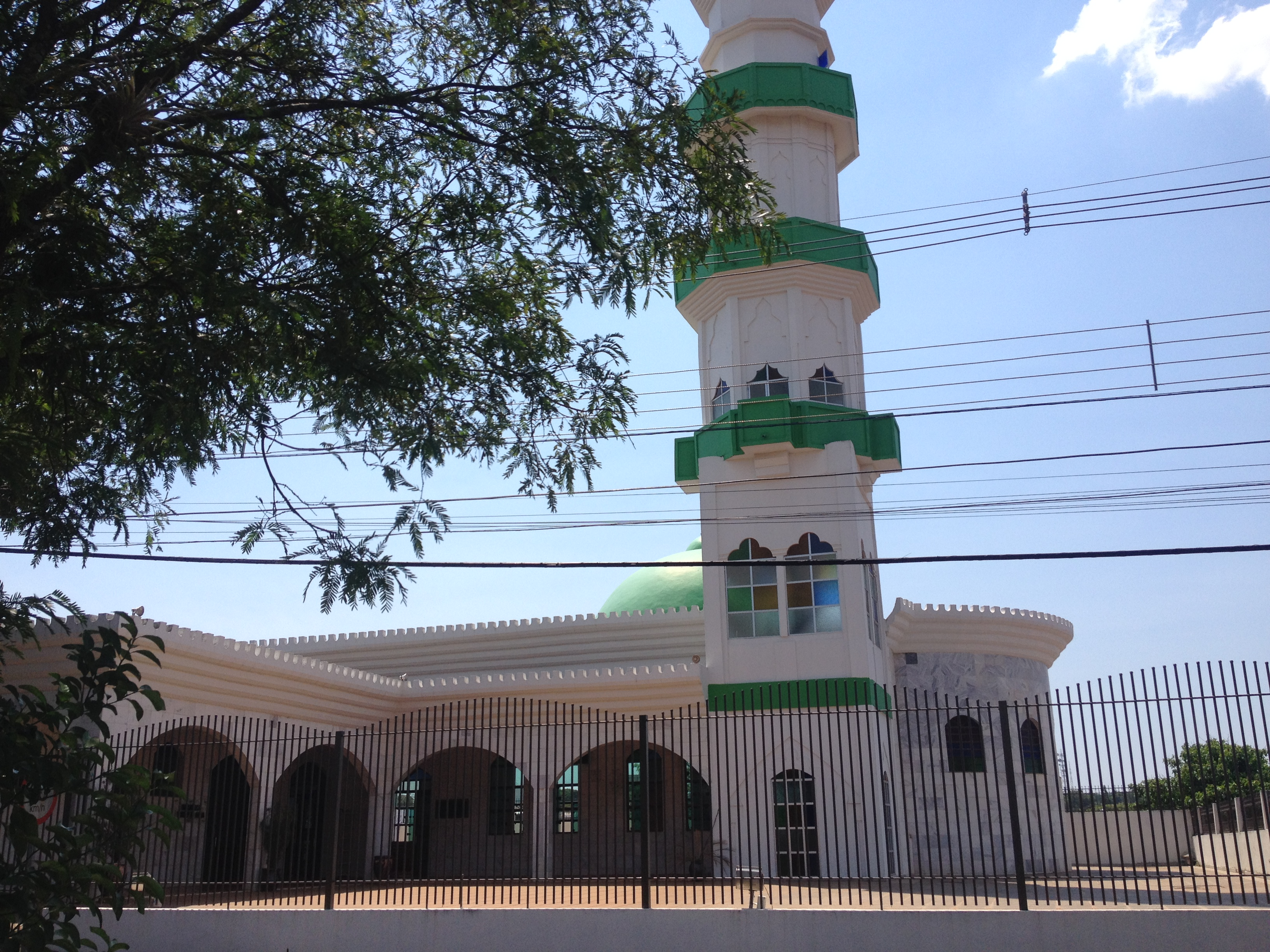 مقر الجمعية الخيريه الاسلاميه - مارينغا